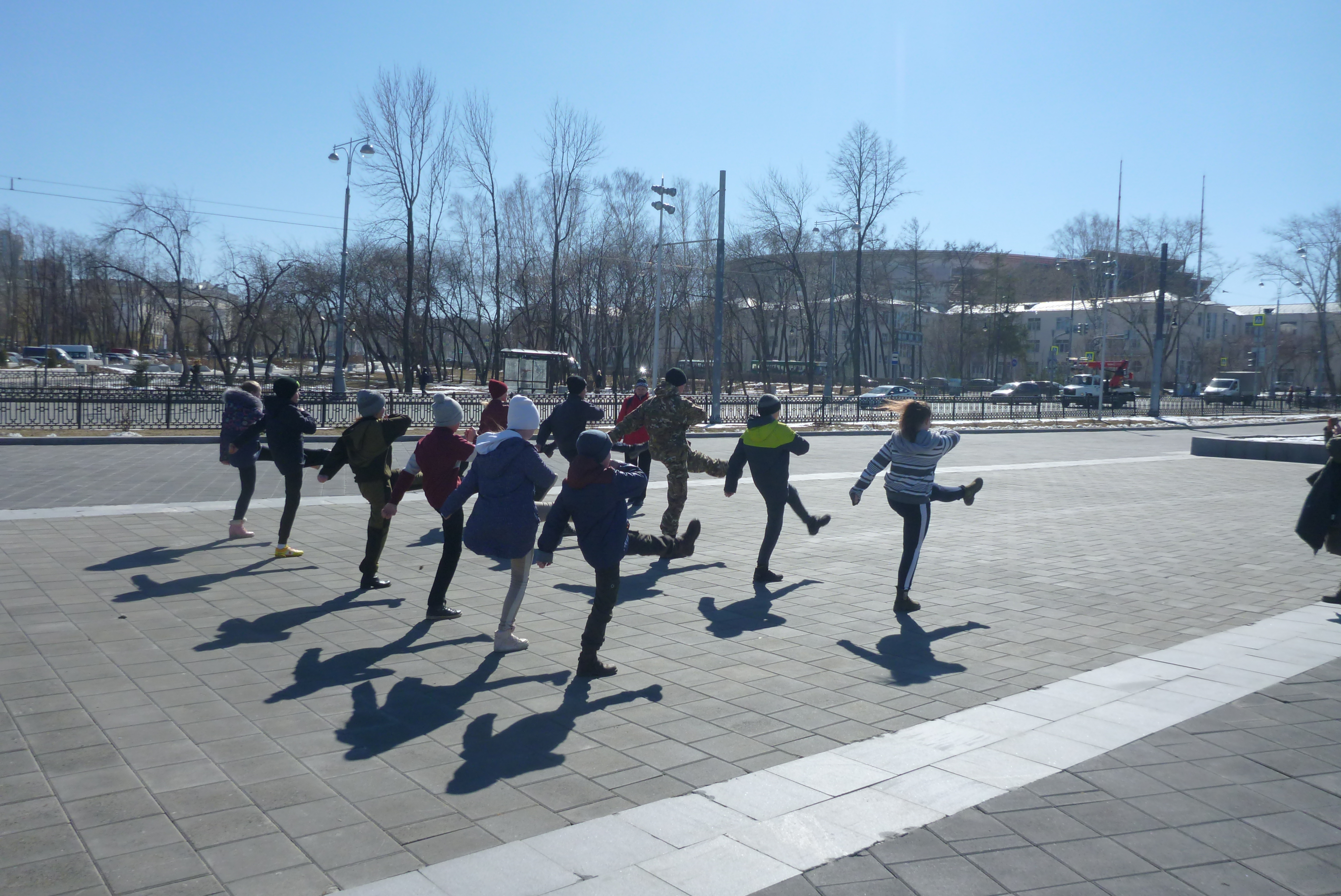 Репетиция у Вечного огня в Екатеринбурге у Дворца молодежи 18 апреля 2019 года